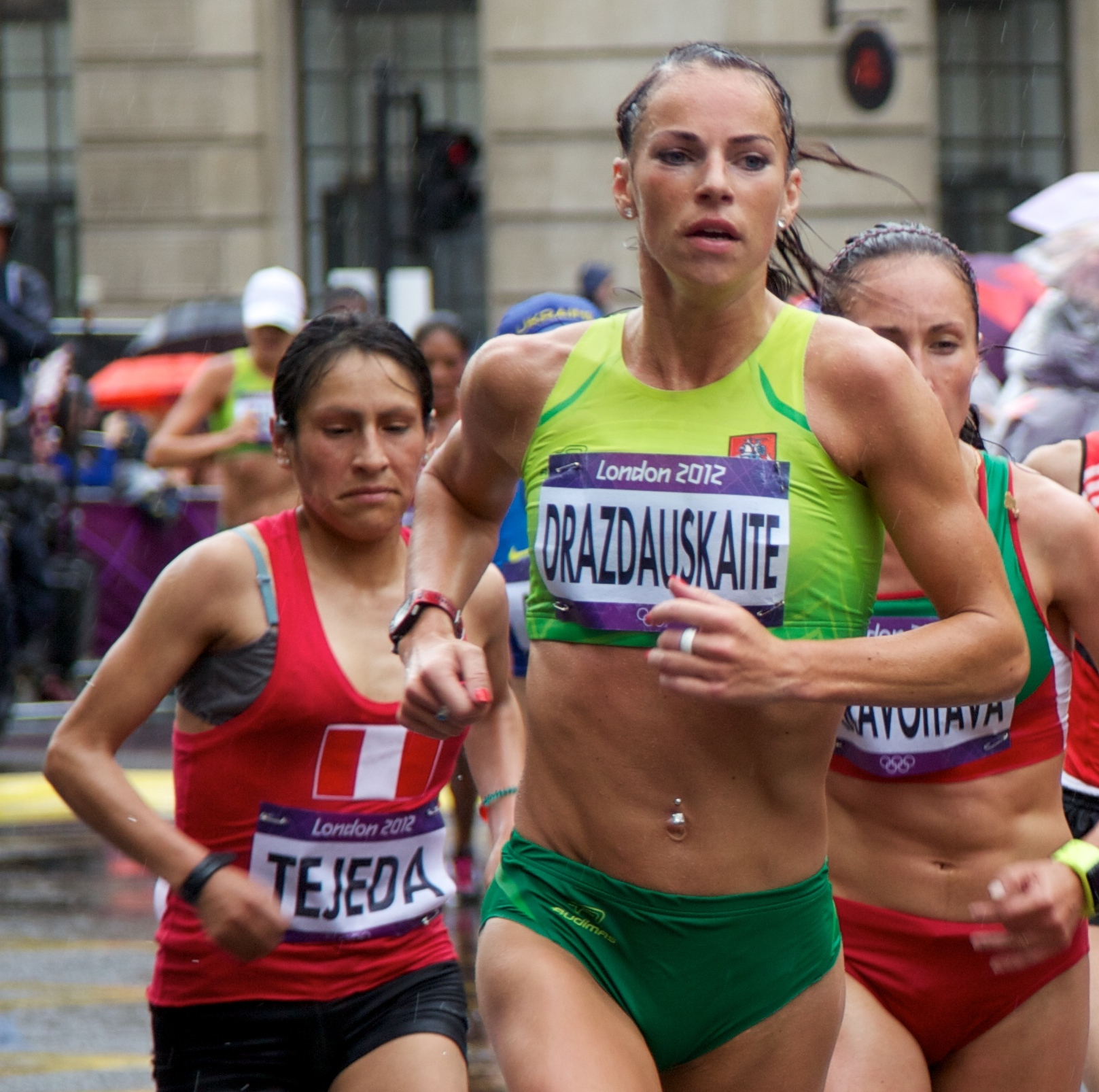 Women's Marathon, Gladys Tejeda (Peru), Rasa Drazdauskaite (Lithuania), Nastassia Staravoitava (Belarus)